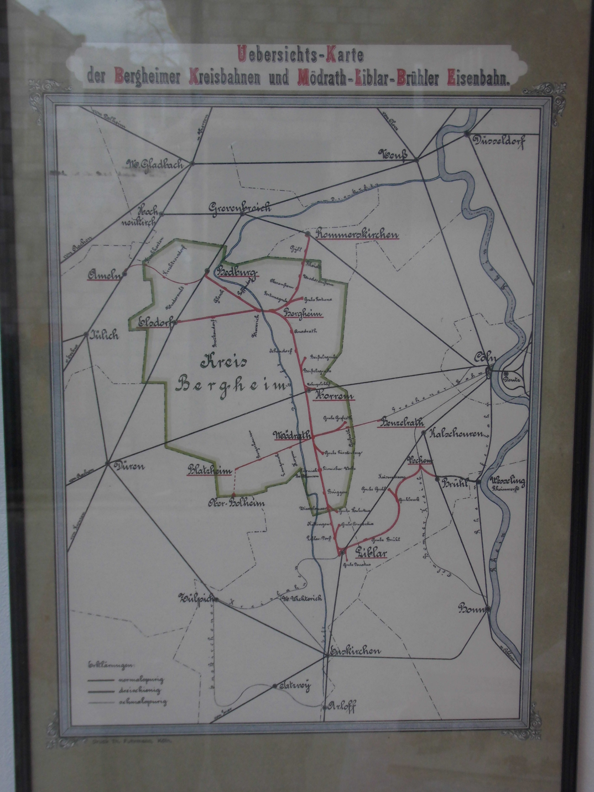 Schienennetz Ende des 19ten Jahrhunderts ? (Schaufensterausstellung des Museumsverein Elsdorf)